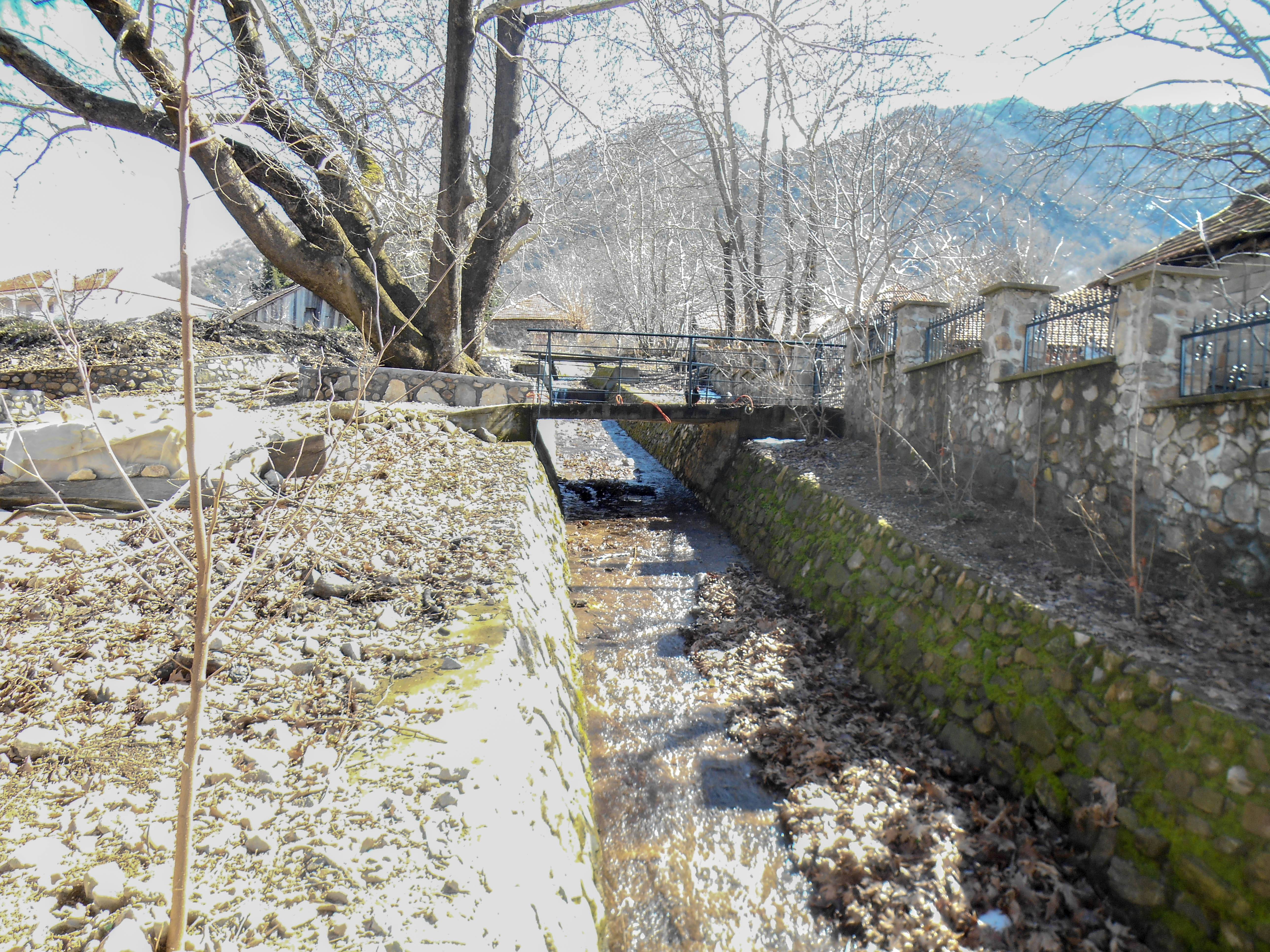 Мокриево